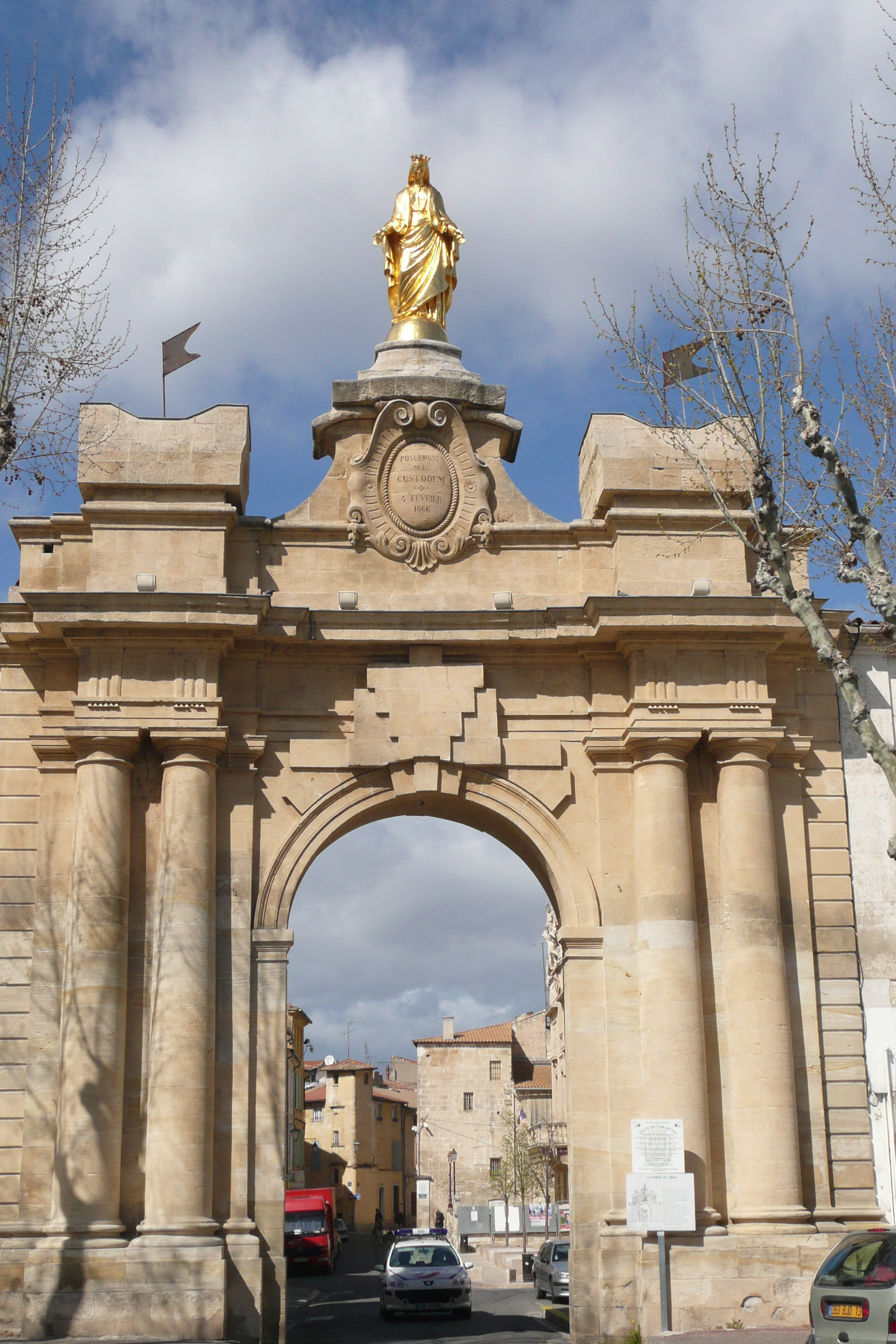 Porte Saint Jean à Tarascon (Bouches-du-Rhône).